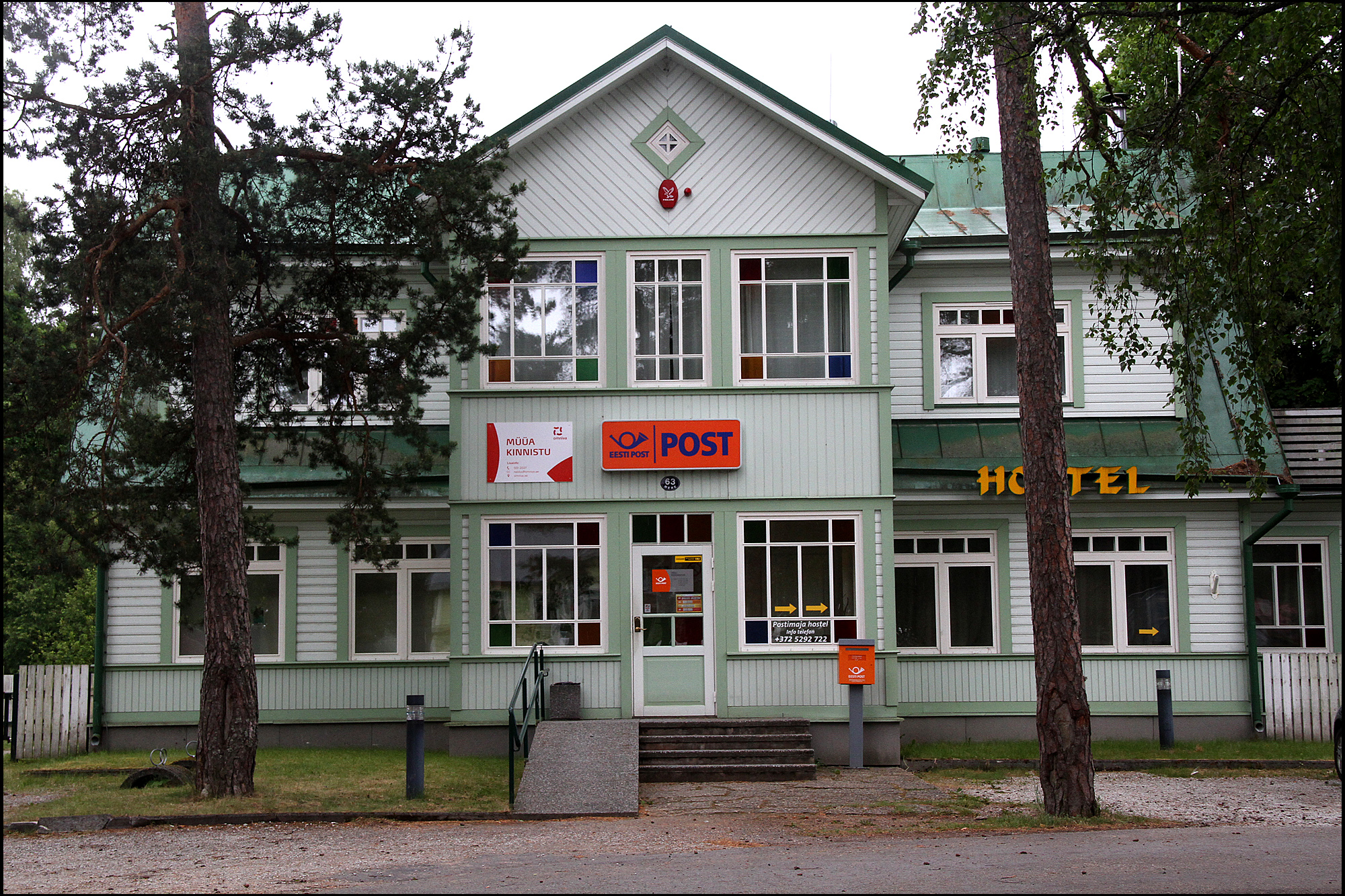 Gemeinde Vösu, Estland, Postamt